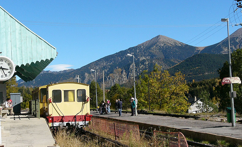 Mont Louis 212